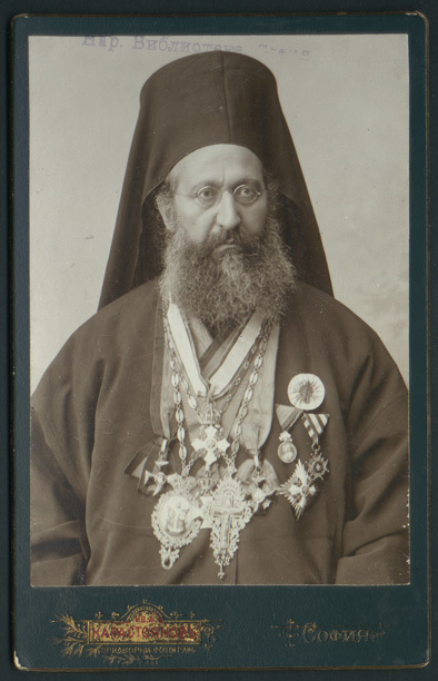 Гервасий Сливенски